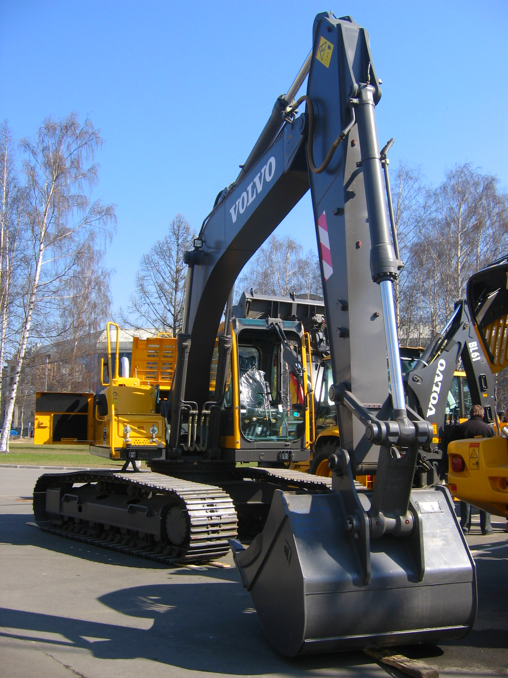 Экскаватор фирмы «Volvo»